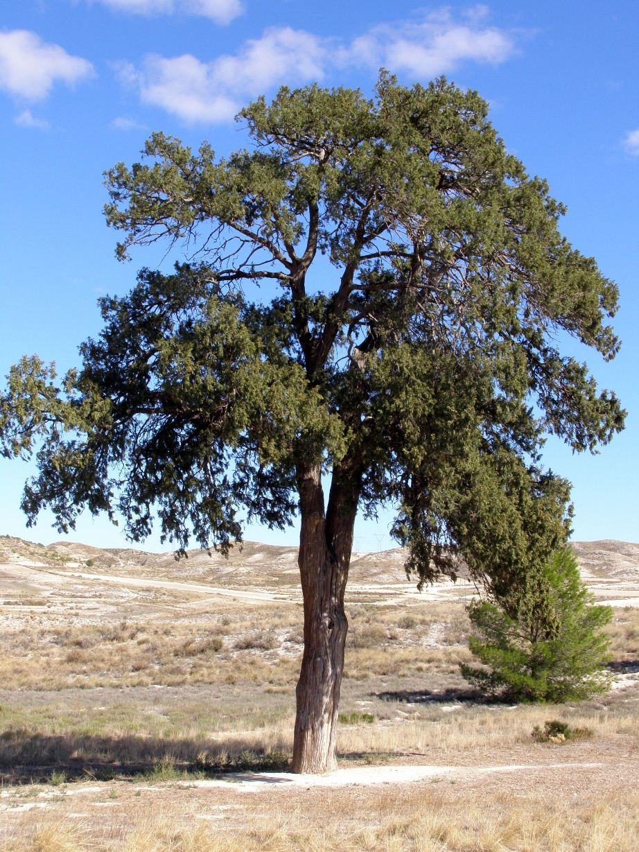 Sabina Villamayor